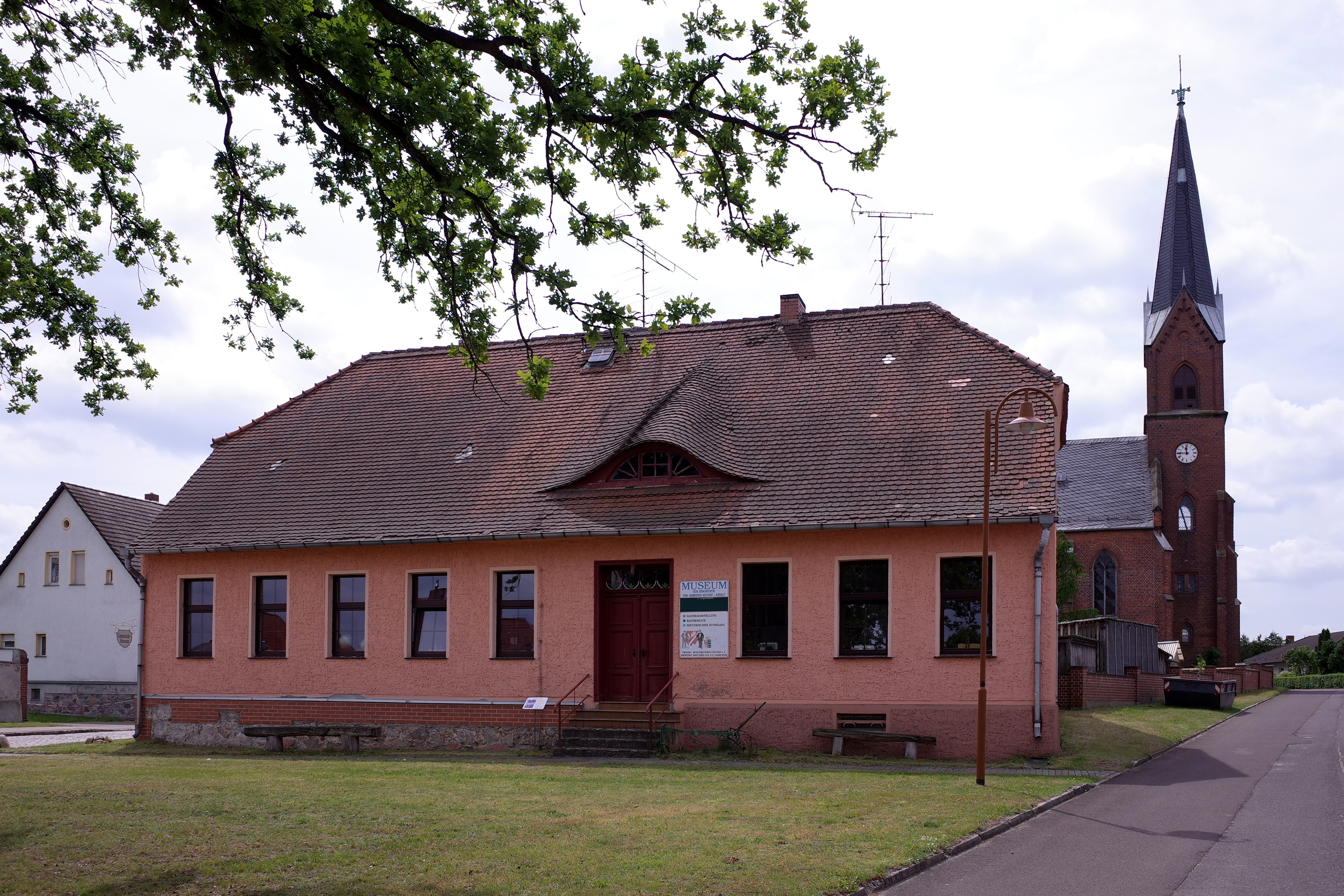 Stadt Zerbst (Anhalt), Dorfschule und Kirche im Ortsteil Reuden/Anhalt.